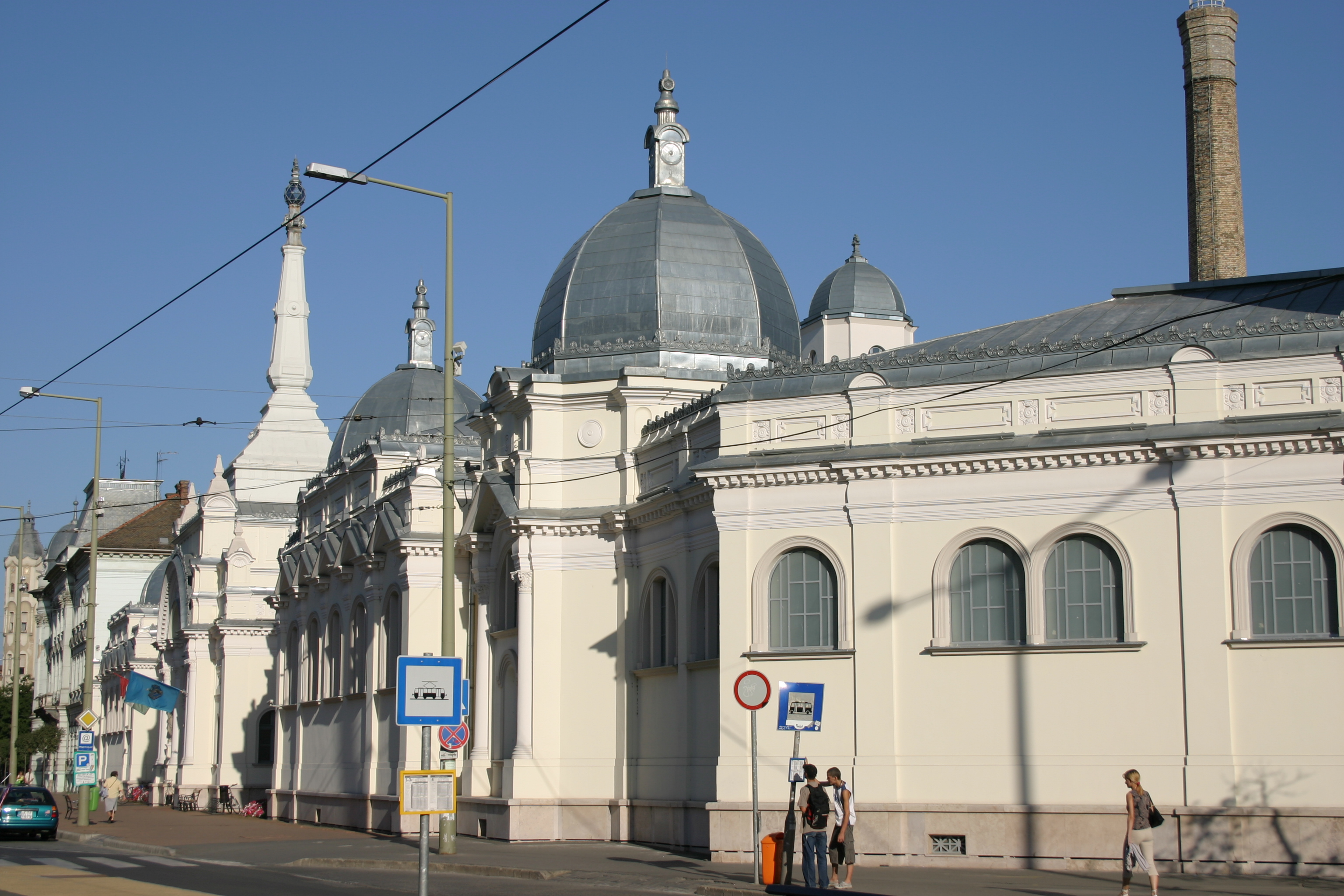 Szeged Anna fürdő (1896-ban építették Steinhardt Antal és Lang Adolf tervei szerint, 1909-ben átépítették, rekonstrukcióját 2004-ben végezték el)